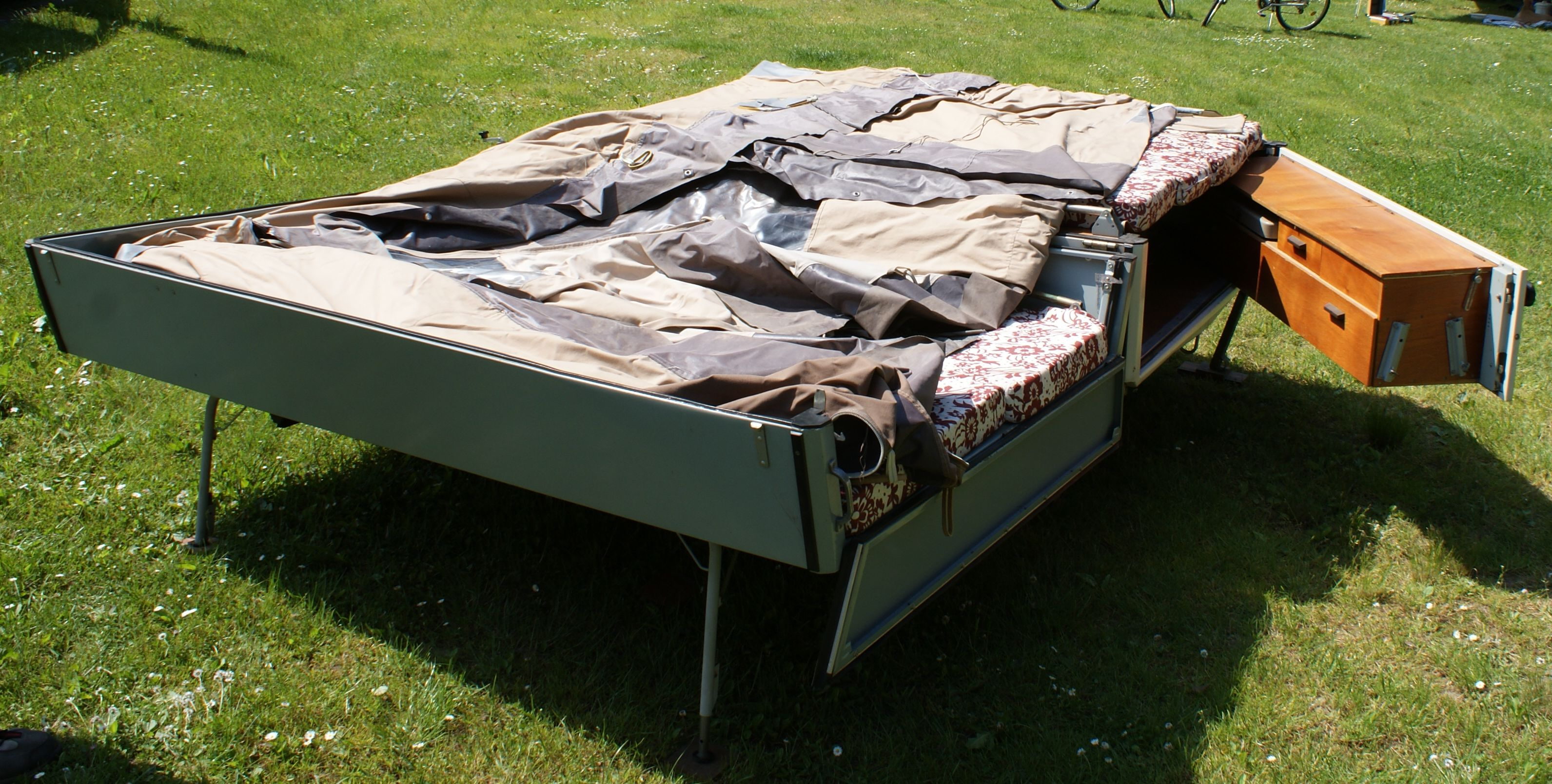 Camptourist CT6-2 beim Aufbau (Klappfix, Alpenkreuzer)